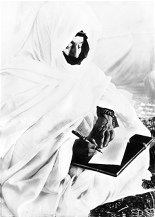 الشيخ امربيه رب بن الشيخ ماء العينين طرفاية 1939